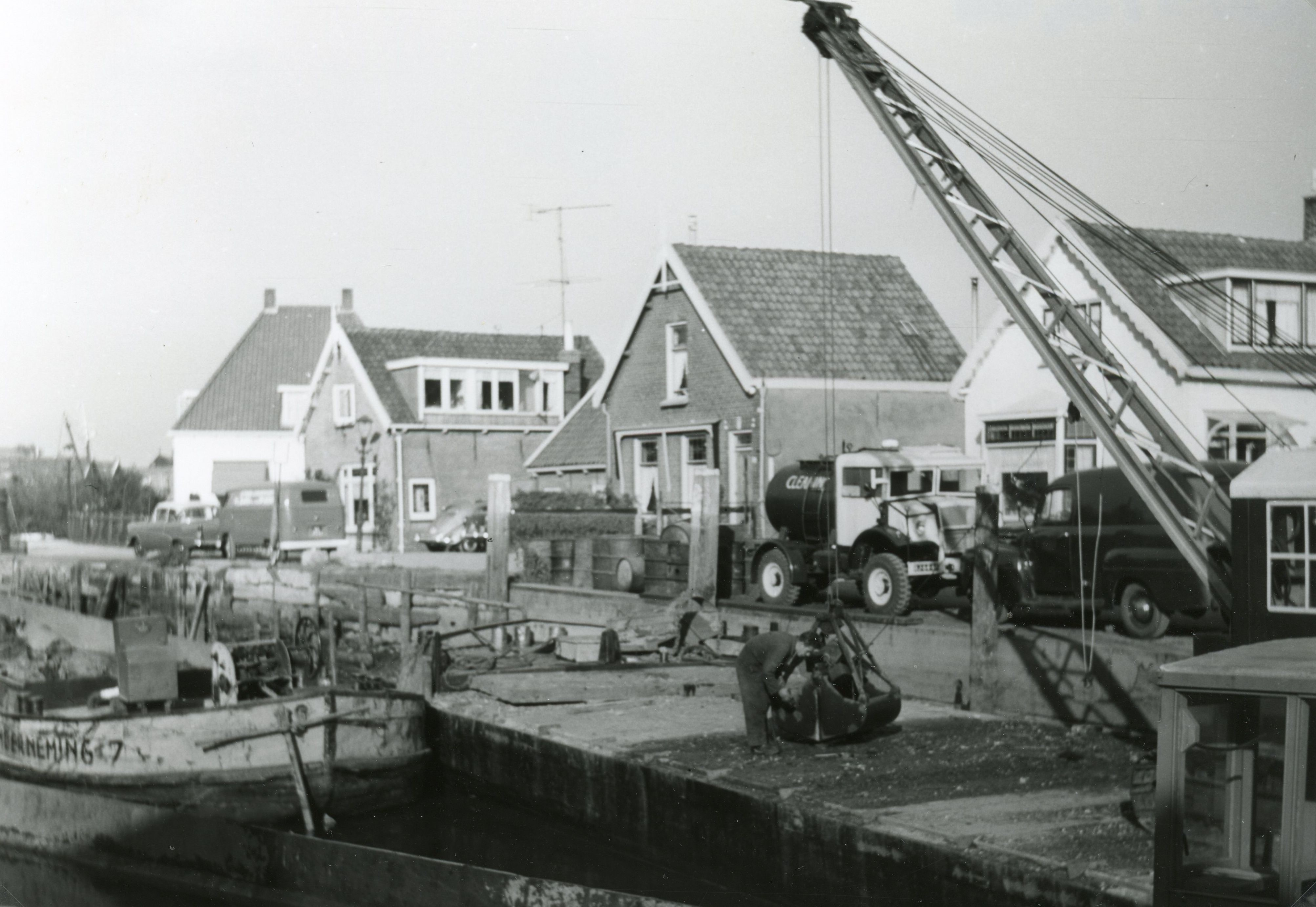 Oostkade Spijkenisse 1962. Sinds 1975 kunnen er geen schepen meer in dit gedeelte van de haven komen en er is andere bebouwing gekomen.